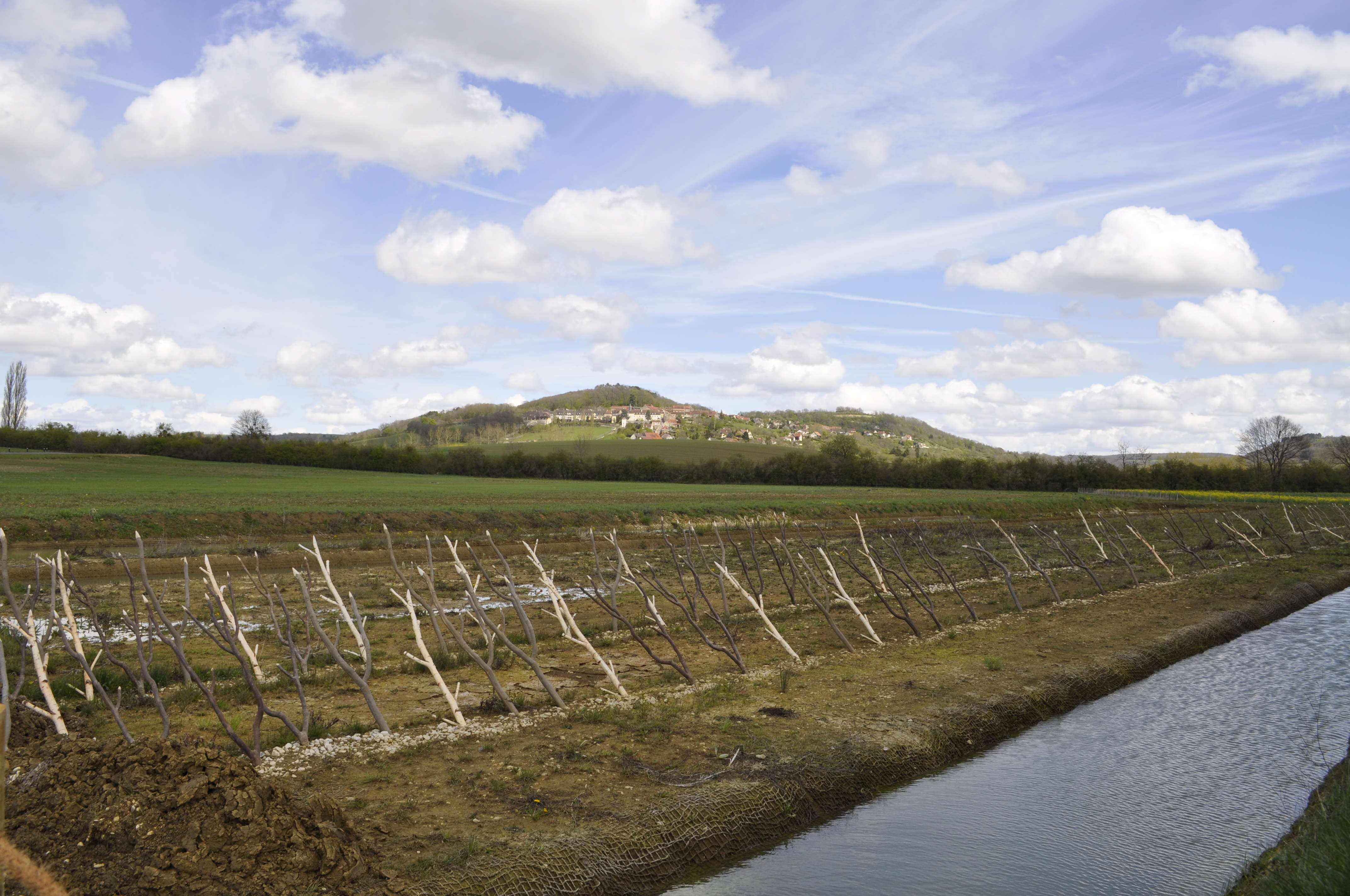 Muséoparc d'Alésia : vue d'Alise Sainte Reine et fortifications